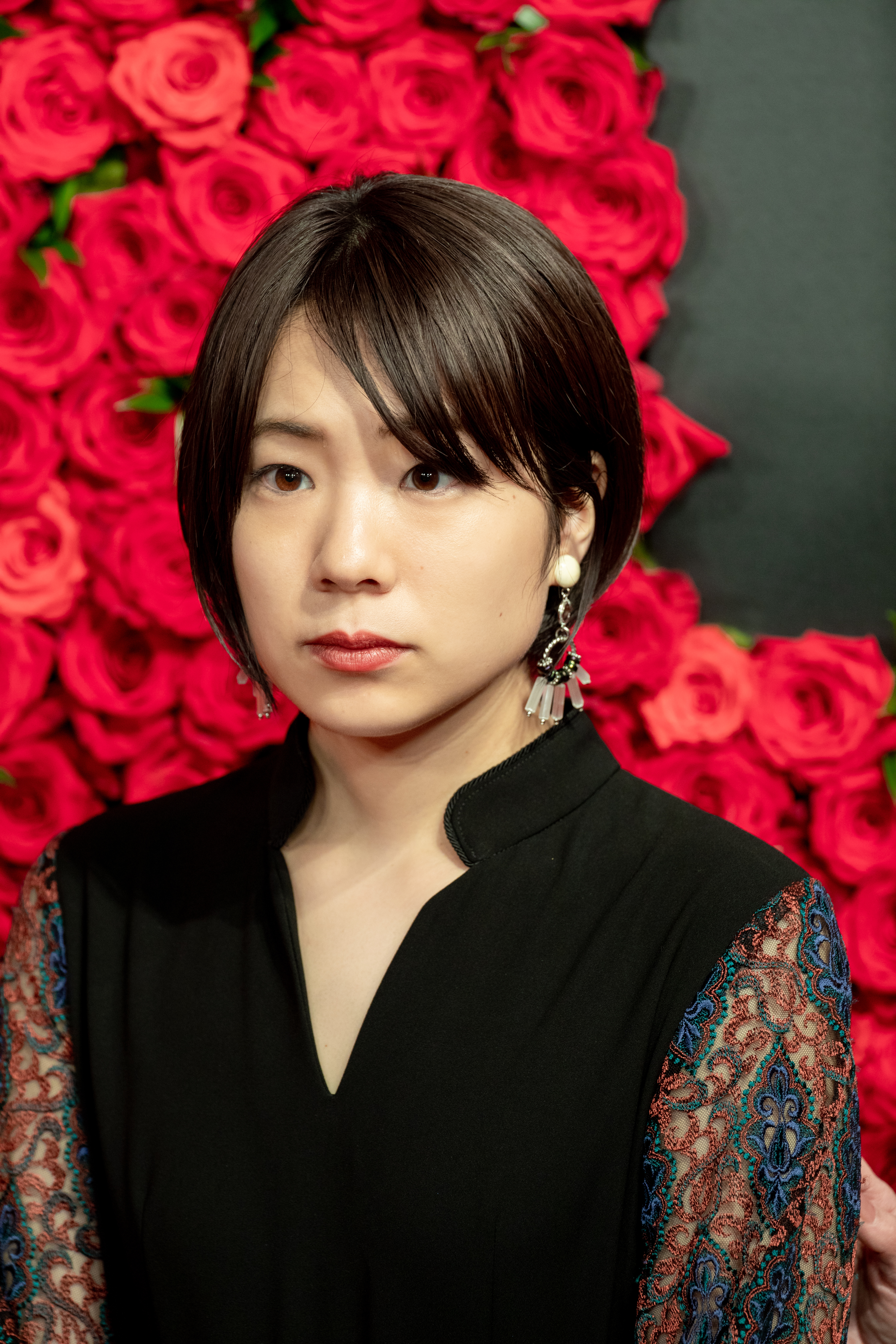 第30回 東京国際映画祭 オープニングセレモニー 真魚 (カメラを止めるな!)